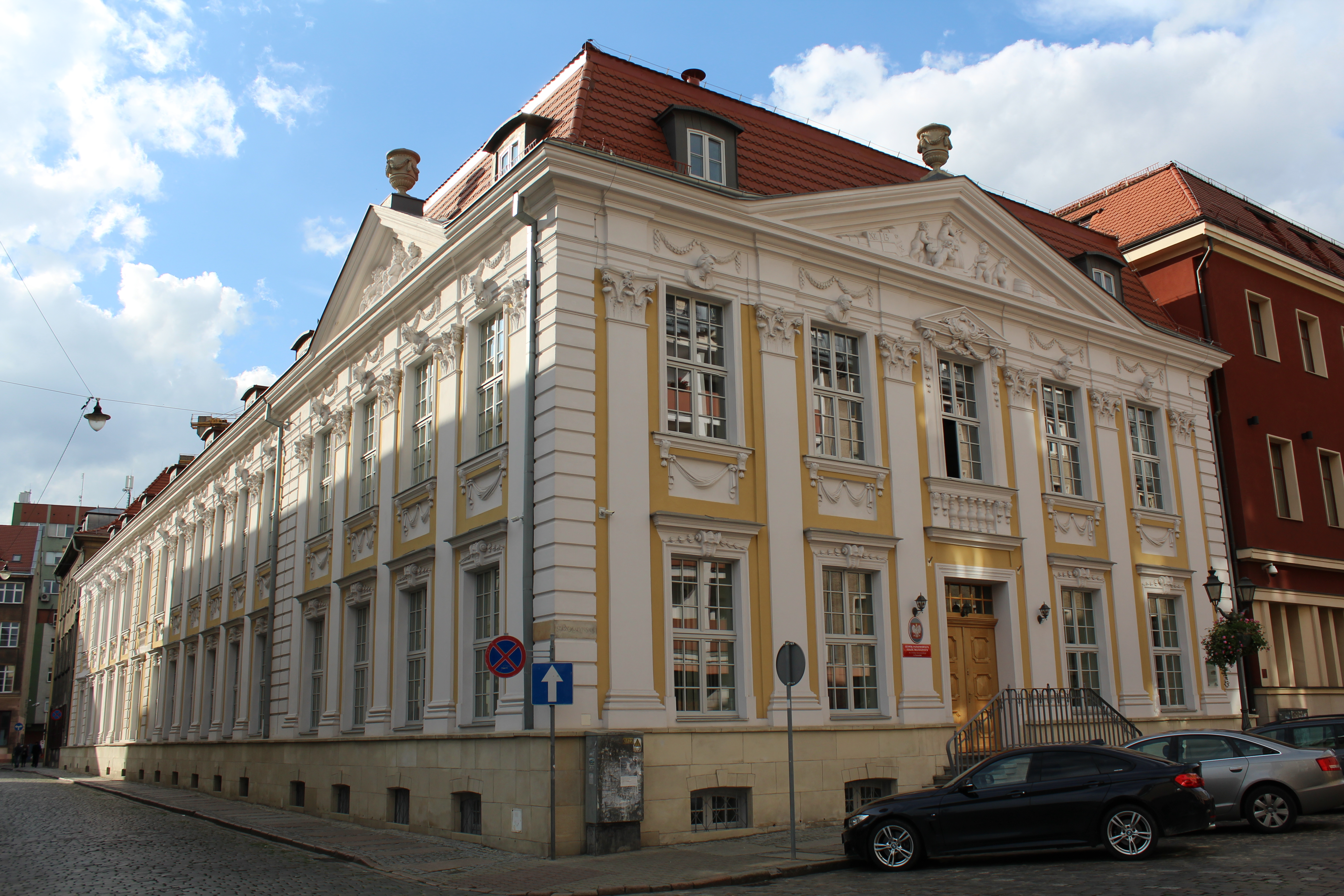 Szczecin, ul. Staromłyńska 13 - Pałac Klasycystyczny (obecnie szkoła muzyczna) w Szczecinie